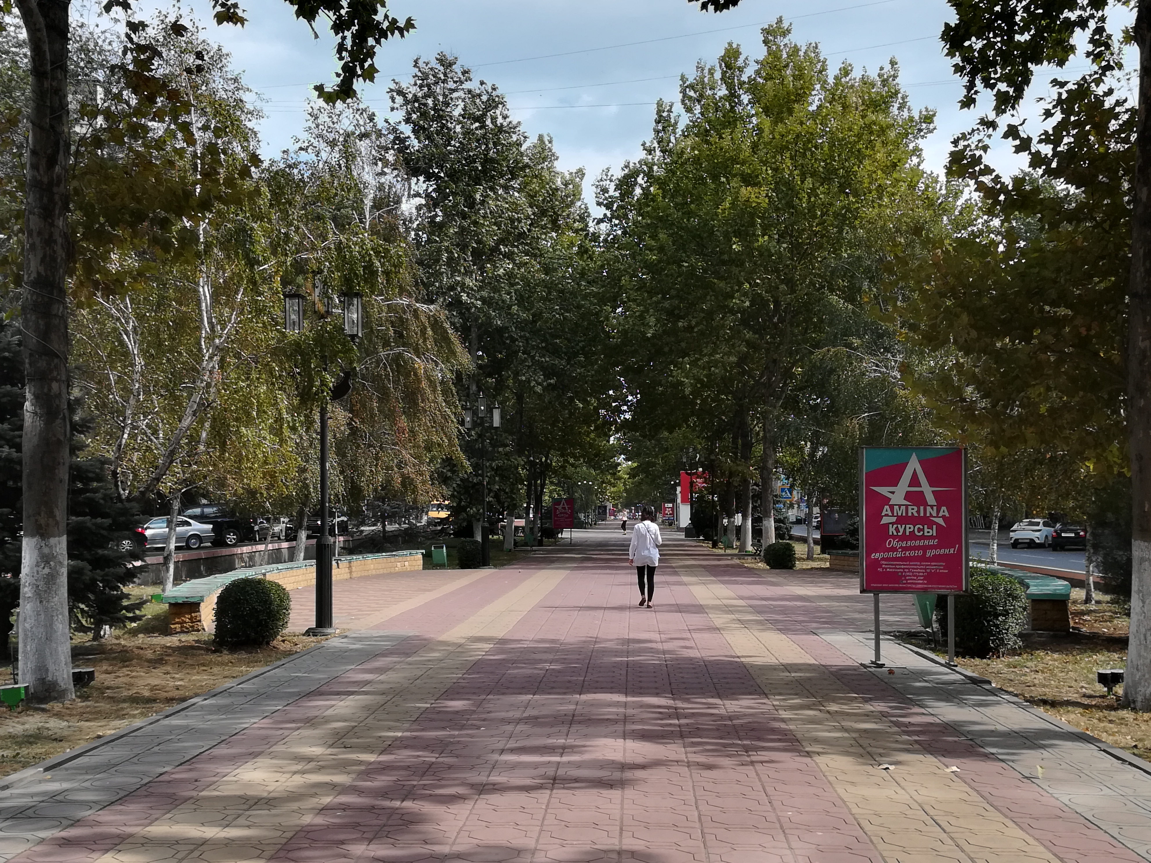 Проспект Расула Гамзатова